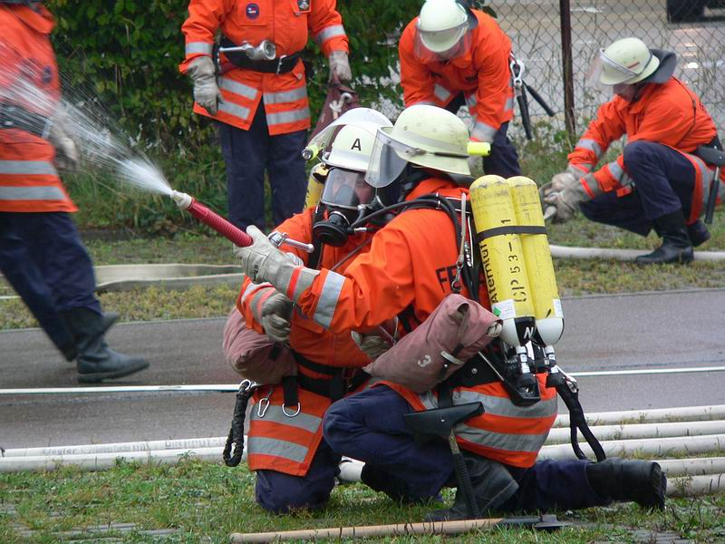 Angriffstrupp Feuerwehr bei einer Übung